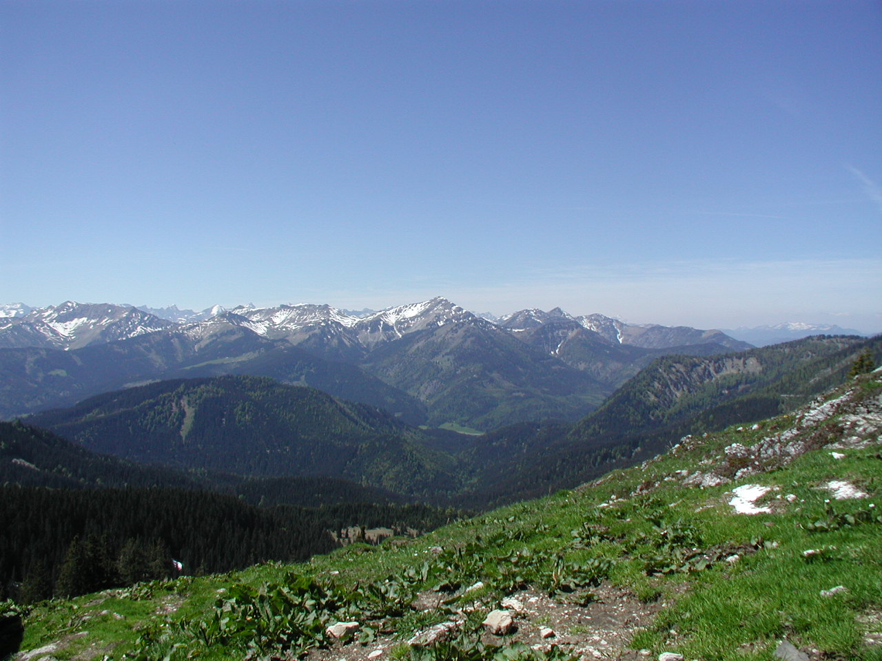 Blick auf das Vorkarwendel